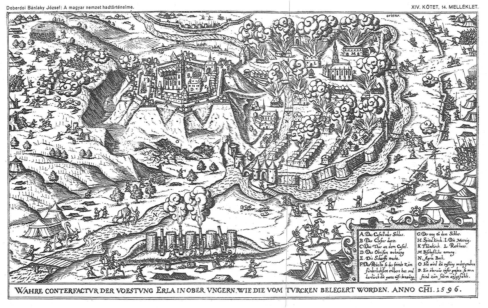 Eger várának látképe az 1596-os ostromakor